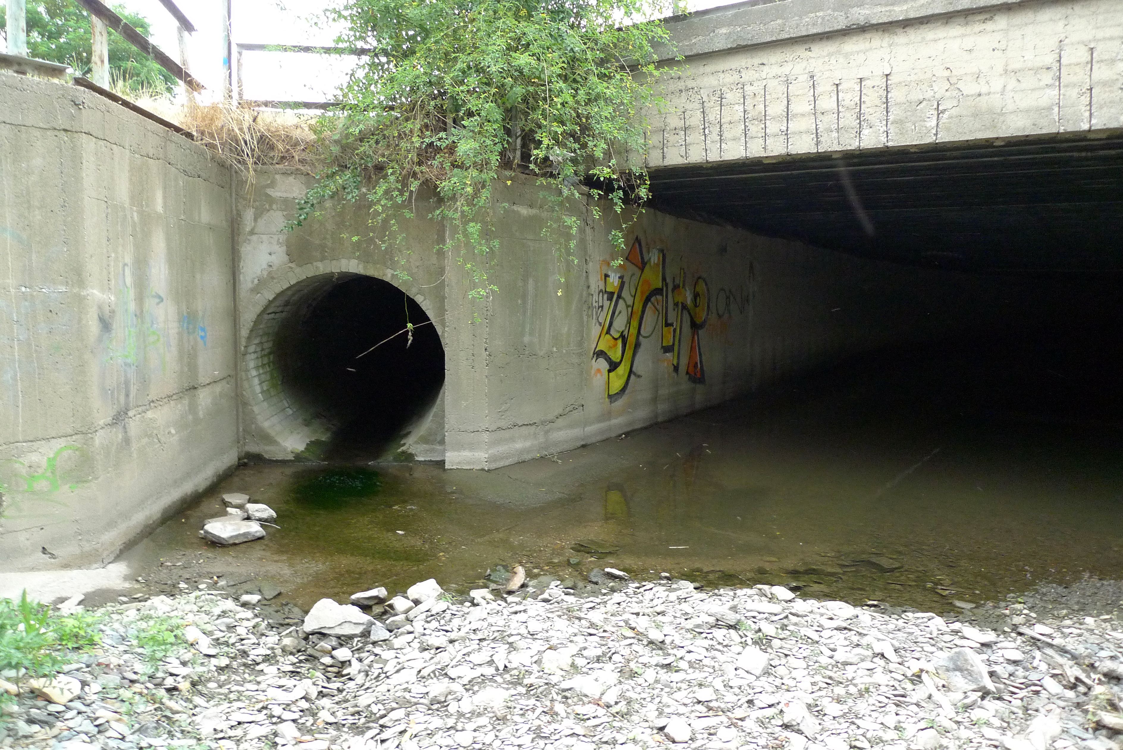 Slatinský potok - jeho ústí do Botiče za odstavným nádražím v Praze-Záběhlicích.